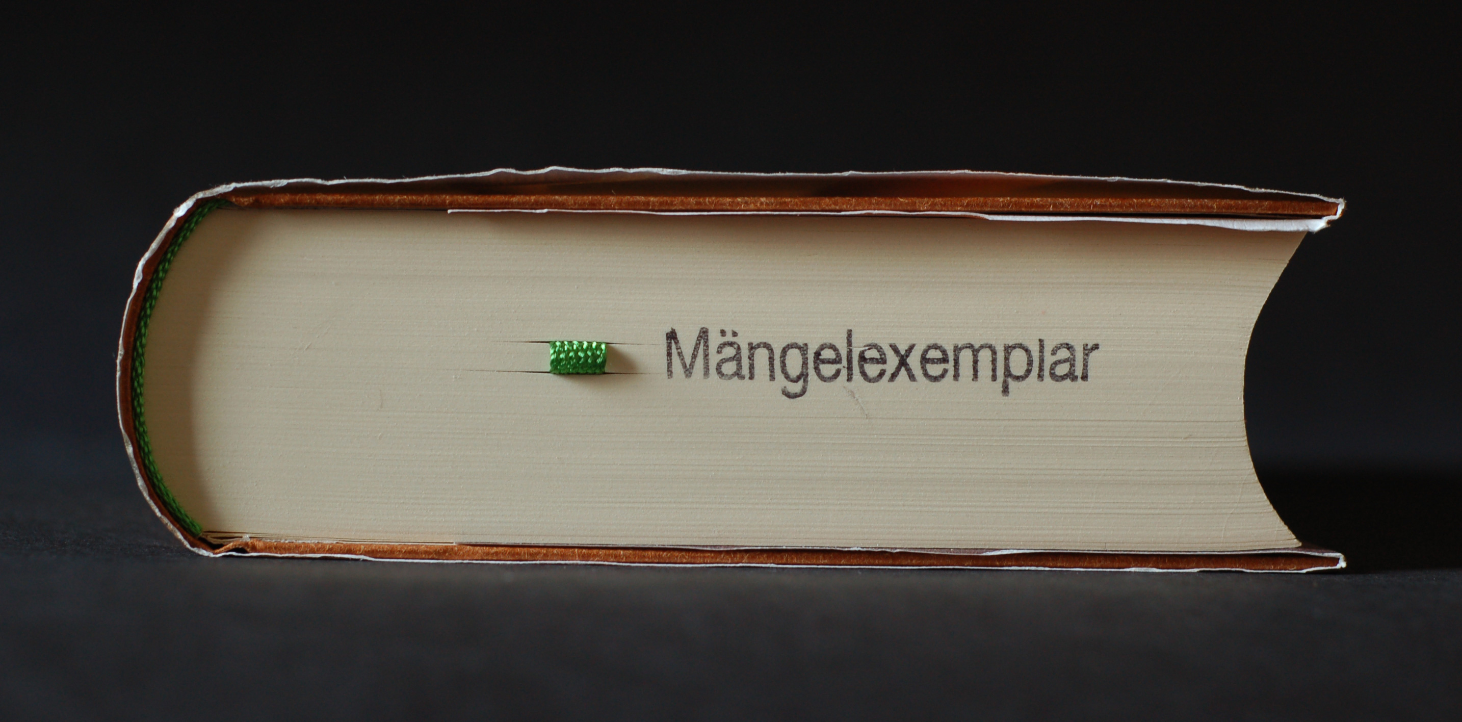 Buch mit Stempelaufdruck "Mängelexemplar" und Lesebändchen. Kapitalband.